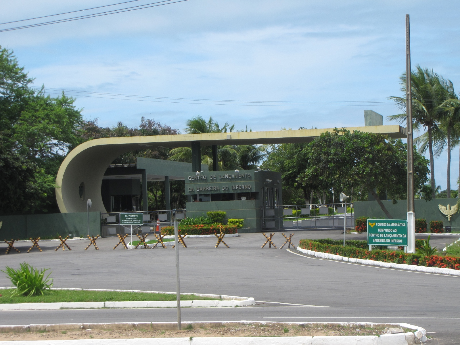 Entrada do Centro de Lançamento da Barreira do Inferno em Natal/RN/Brasil.